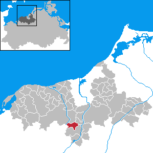 Bröbberow in Mecklenburg-Western Pomerania - District Bad Doberan